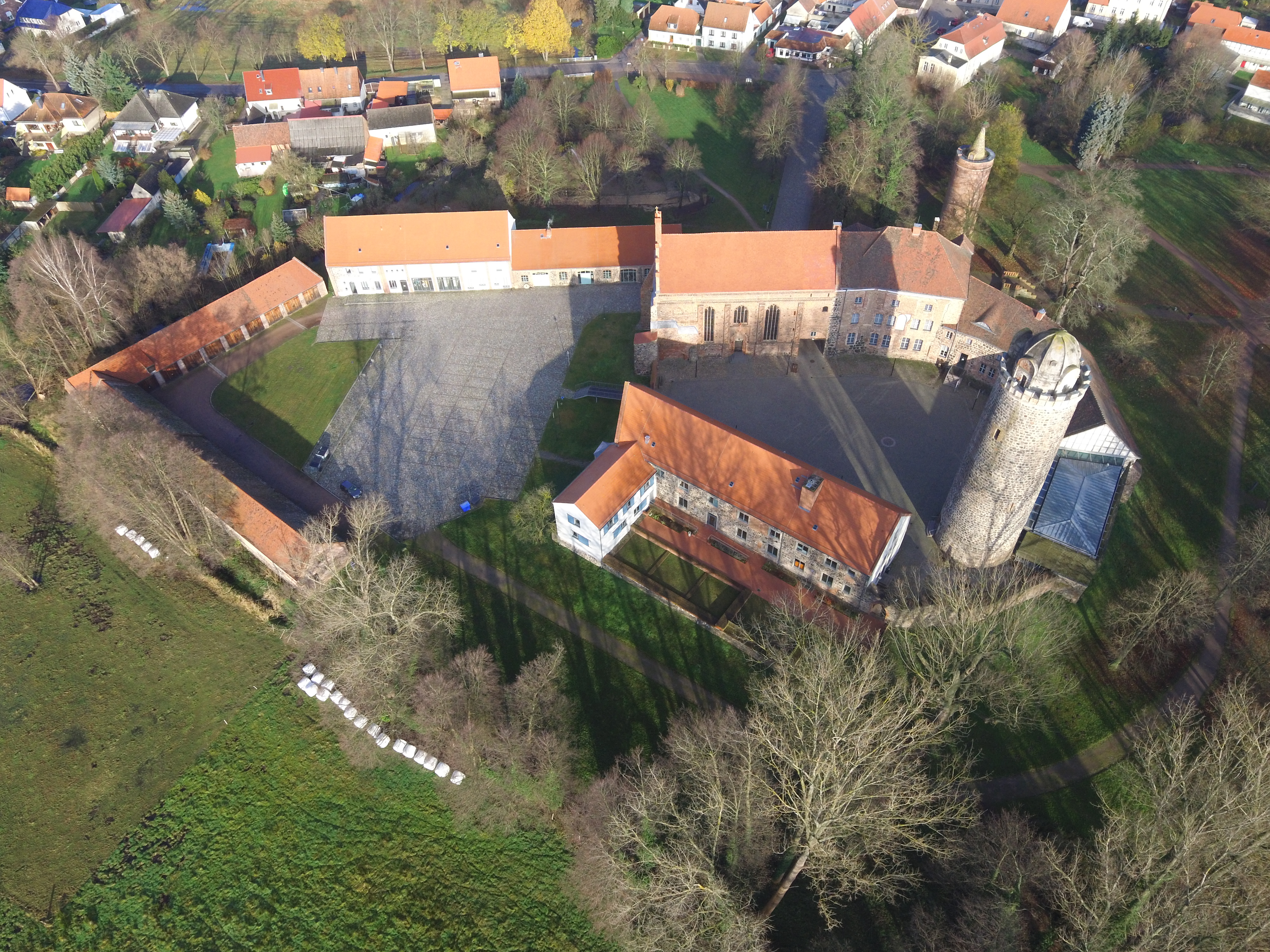 Burg Ziesar Luftbild